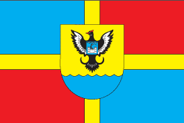 Прапор Чуднівського району